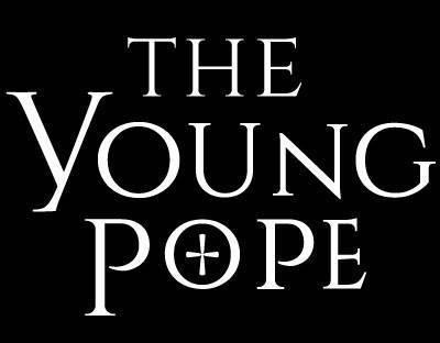 Logo de la série